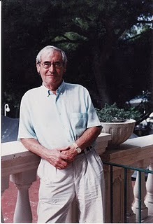 Pintor Fernando Beorlegui